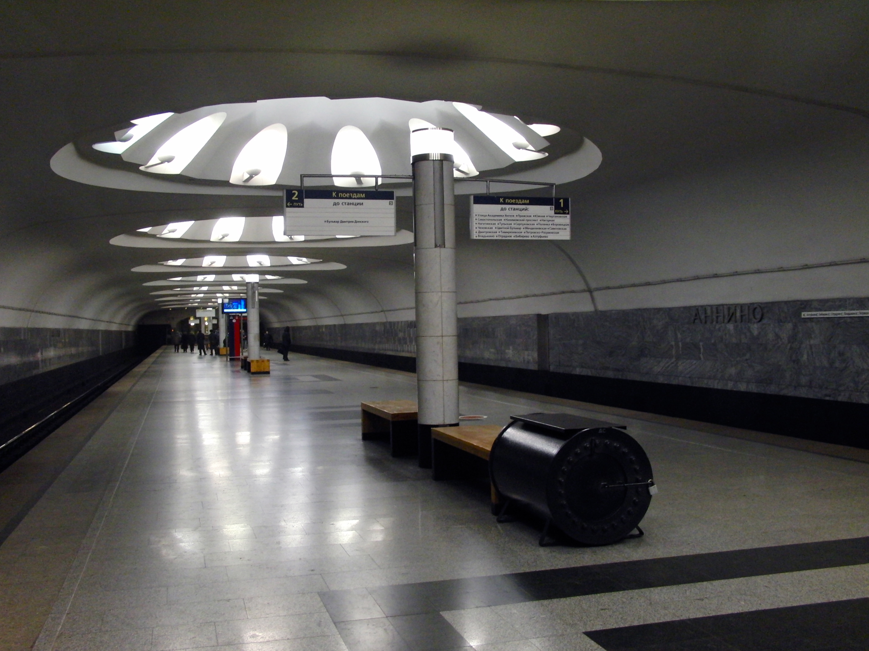 Annino (Аннино)